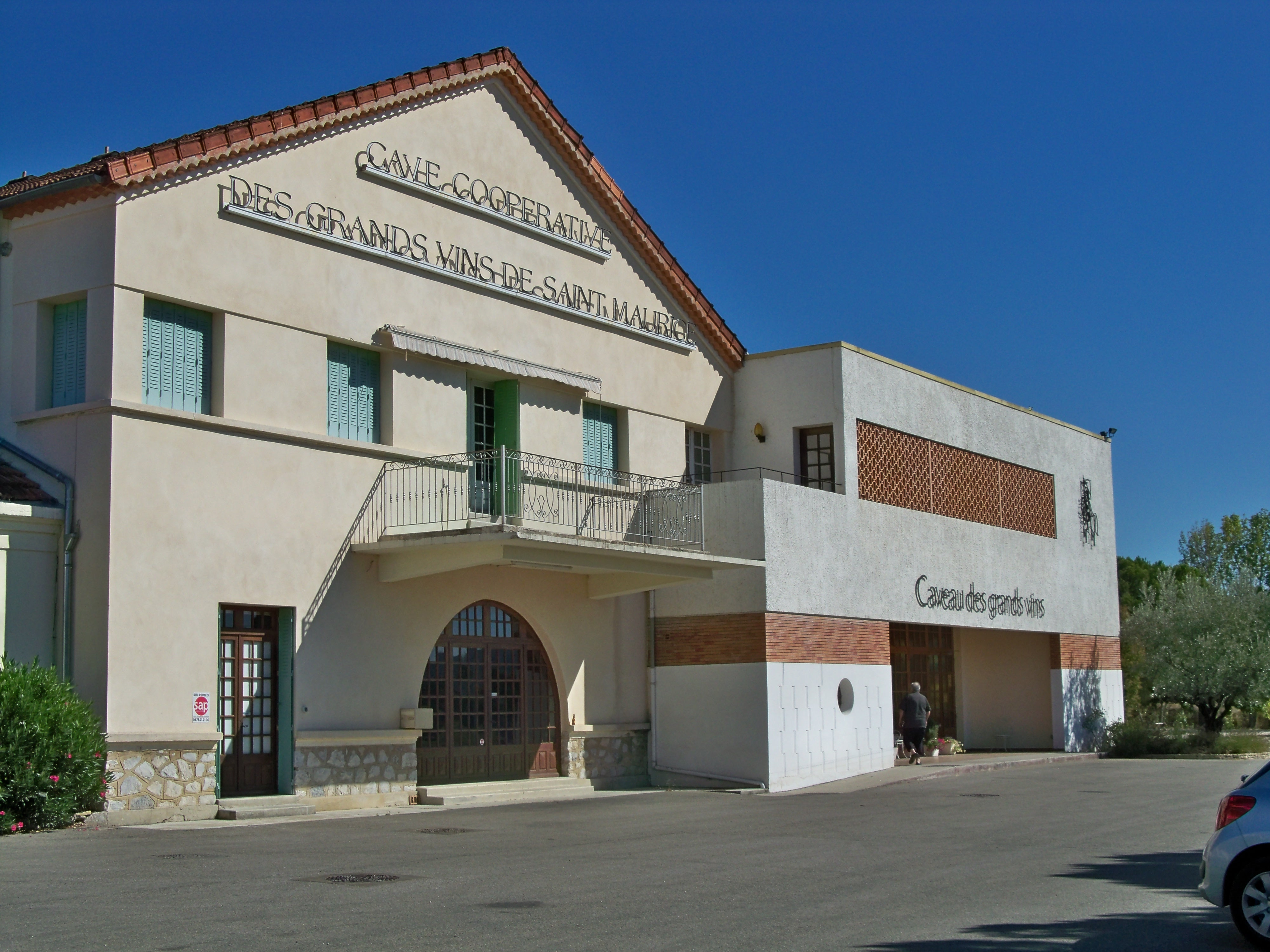 Cave vinicole de Saint Maurice sur Eugyes, Drôme, France